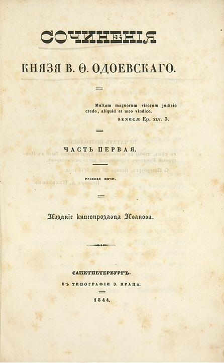 Ruské noci Vladimira Odojevského